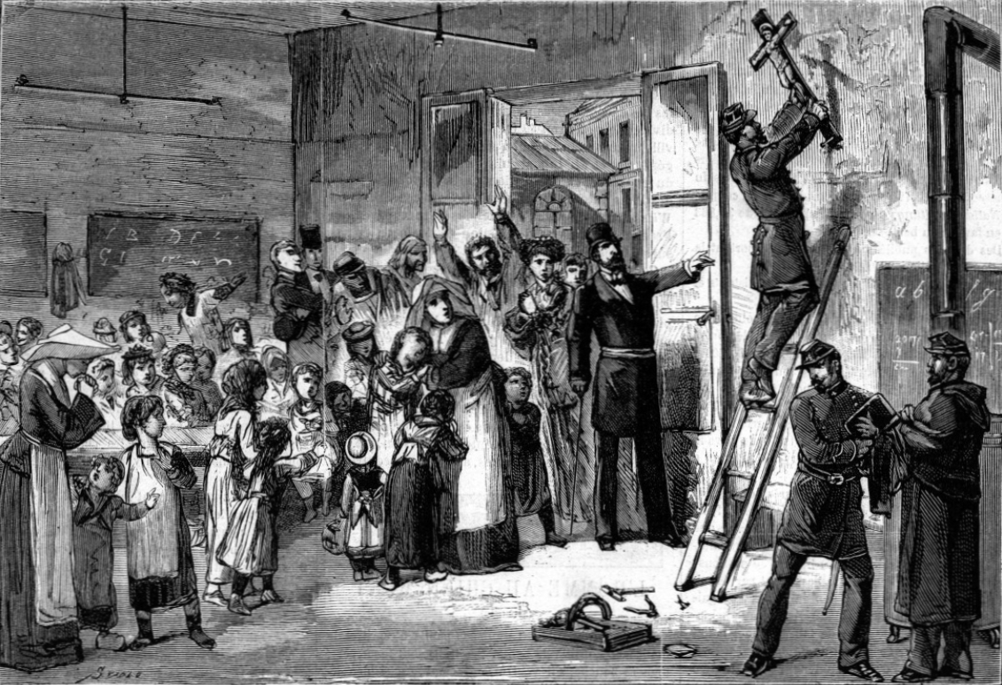 Enlèvement des crucifix dans les écoles de la ville de Paris. La scène représentée a lieu le 20 février 1881.